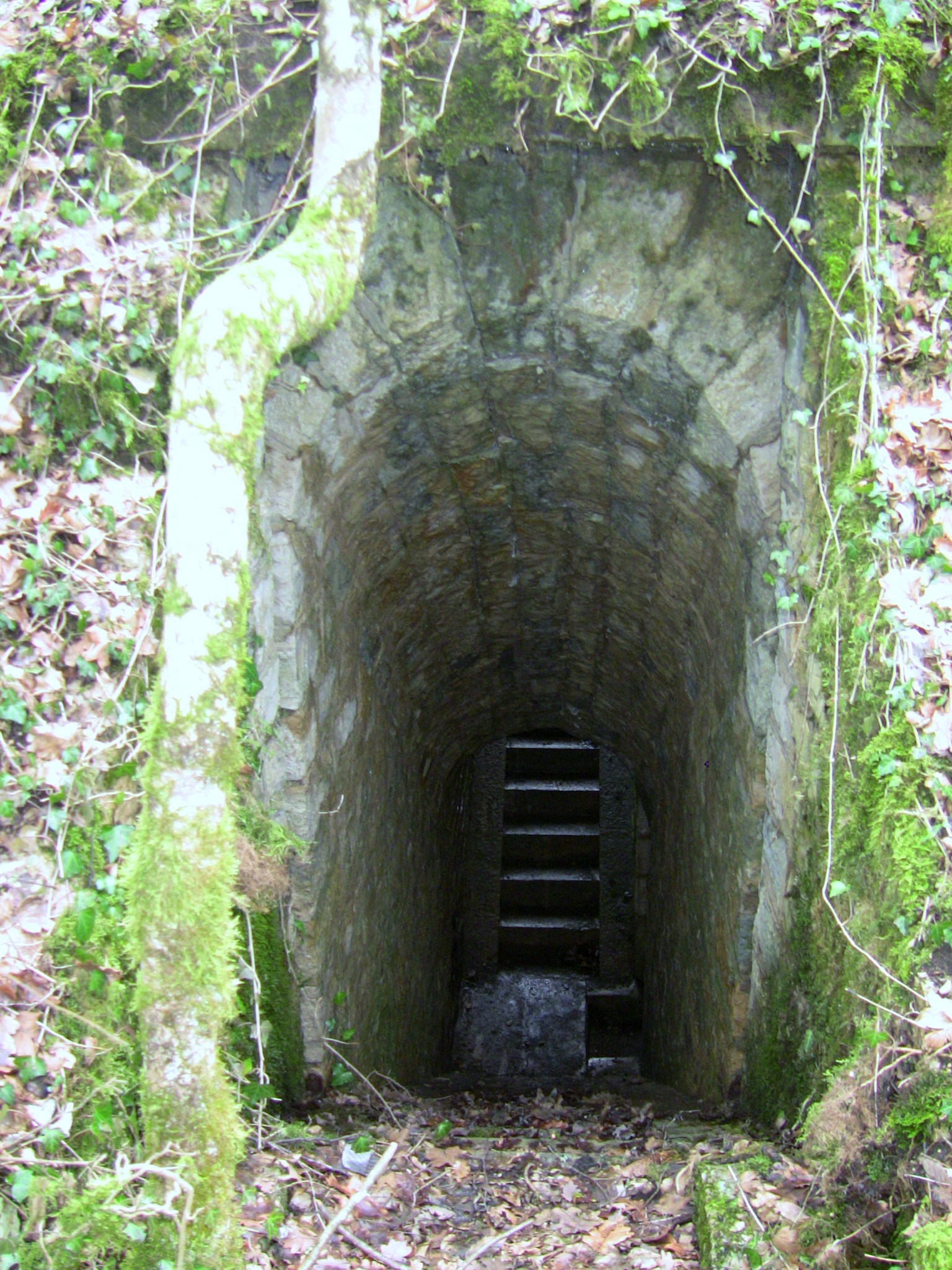 Rampes d'accès entre les différentes chambres de la batterie centrale du fort de Planoise, à Besançon (Doubs, France).